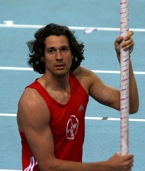 Danny Ecker, German pole vaulter